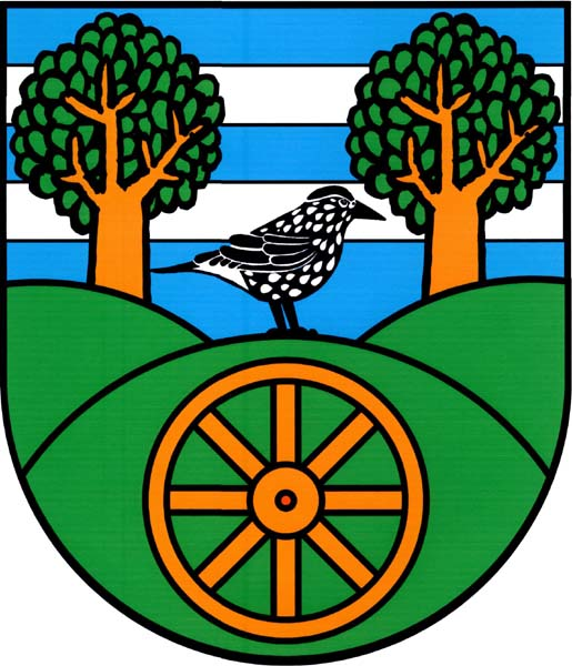 znak obce Paseky